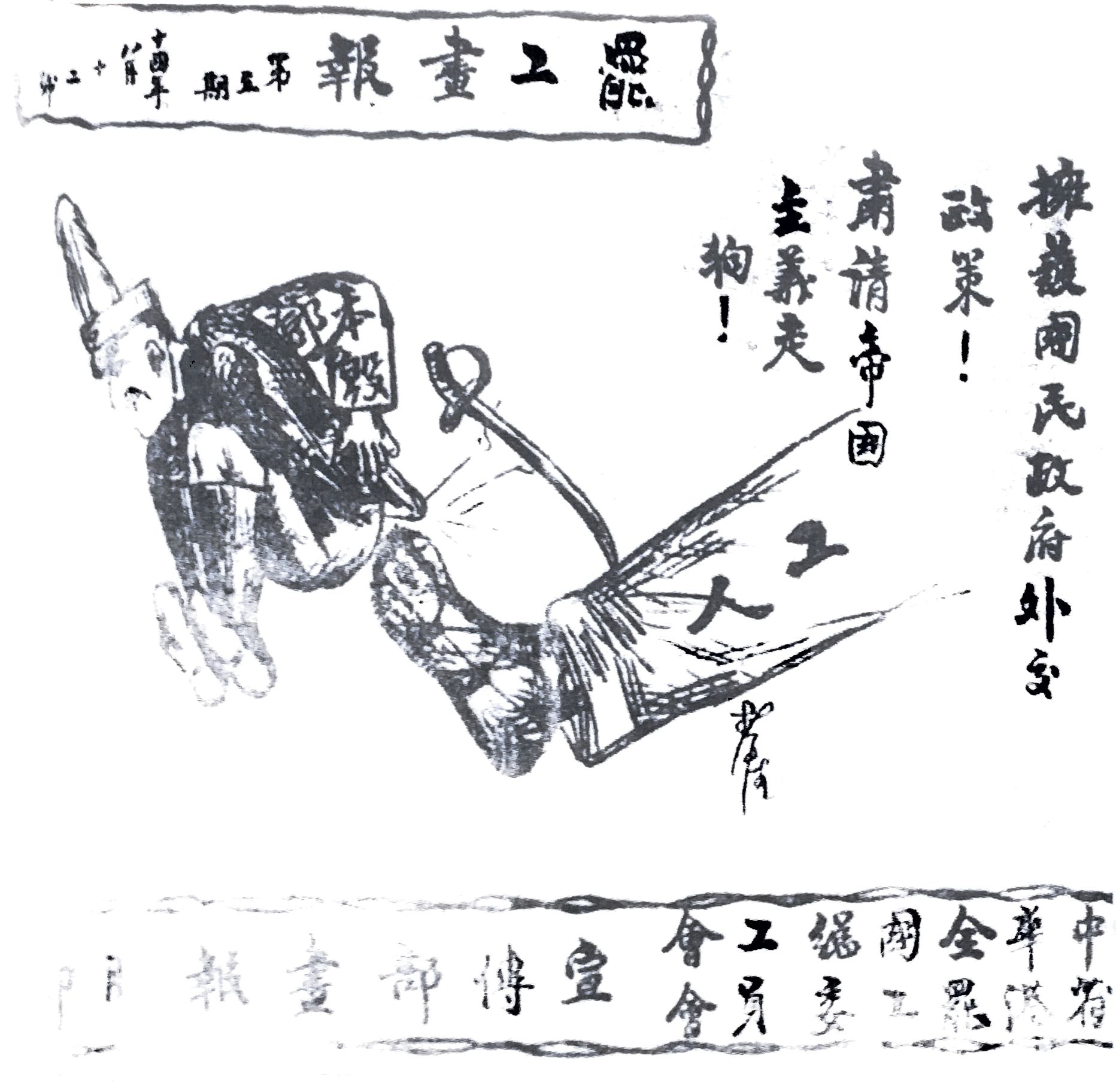 国民政府“打倒邓本殷”的宣传漫画